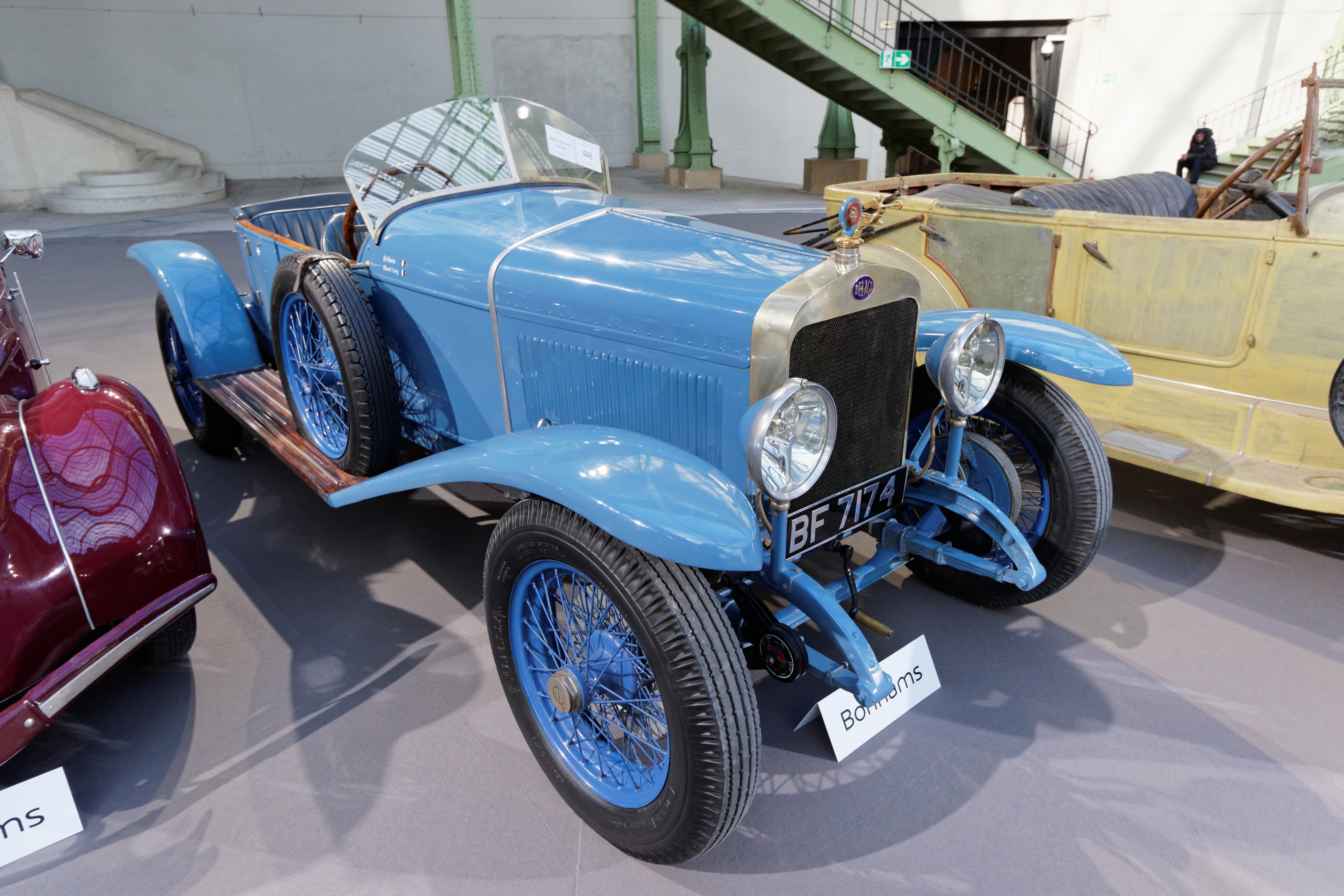 Un des véhicules présenté lors de la vente aux enchères Bonhams 2015 au Grand Palais de Paris.